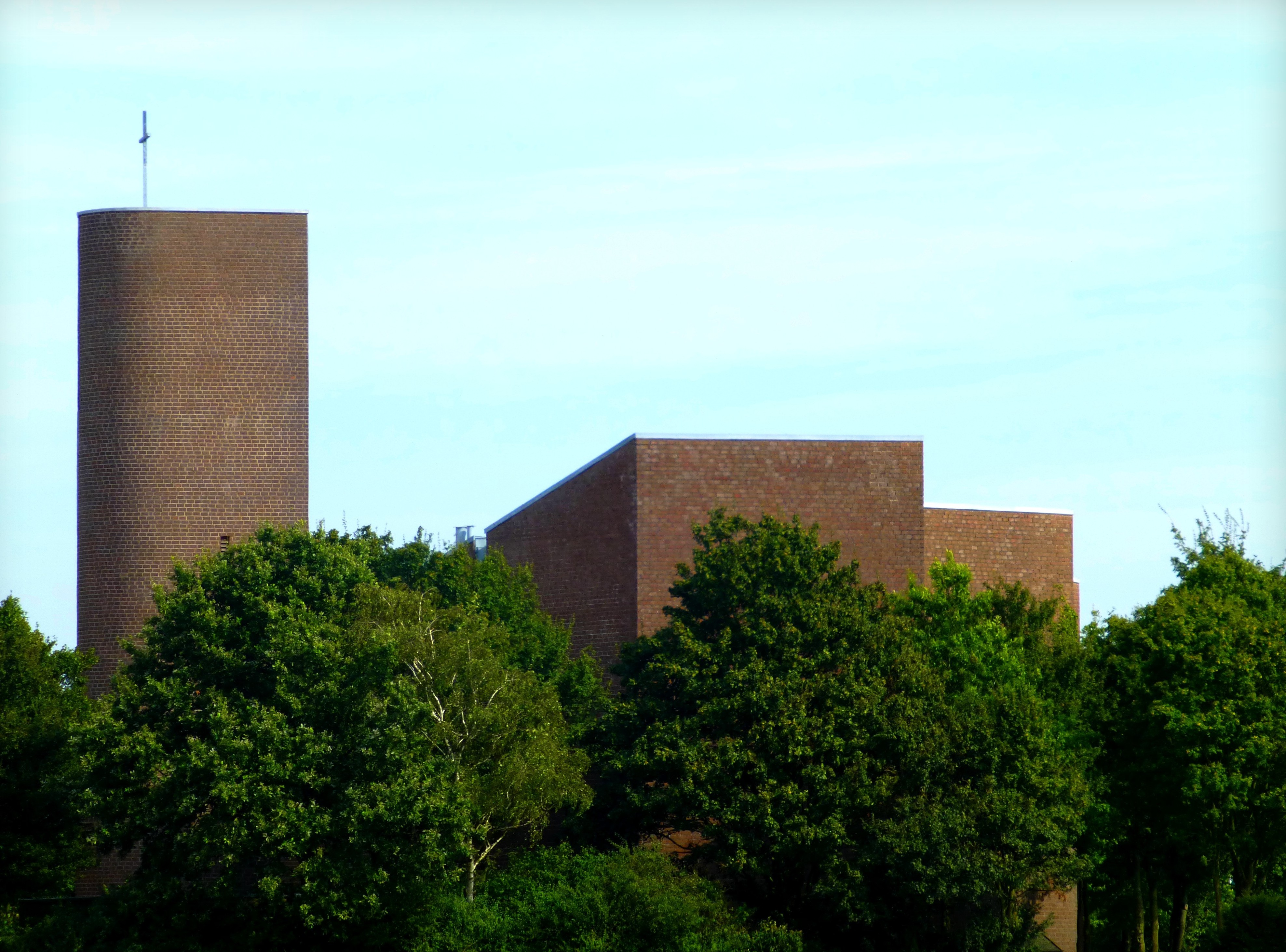 Kehrum – die kath. Kirche St. Hubertus wurde 1968 geweiht